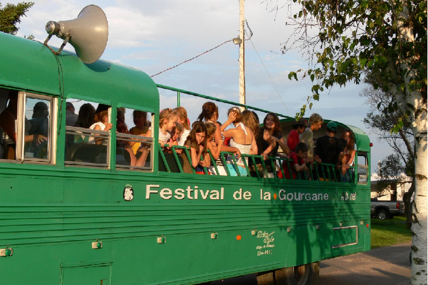 L'autobus du festival de la gourgane d'Albanel.